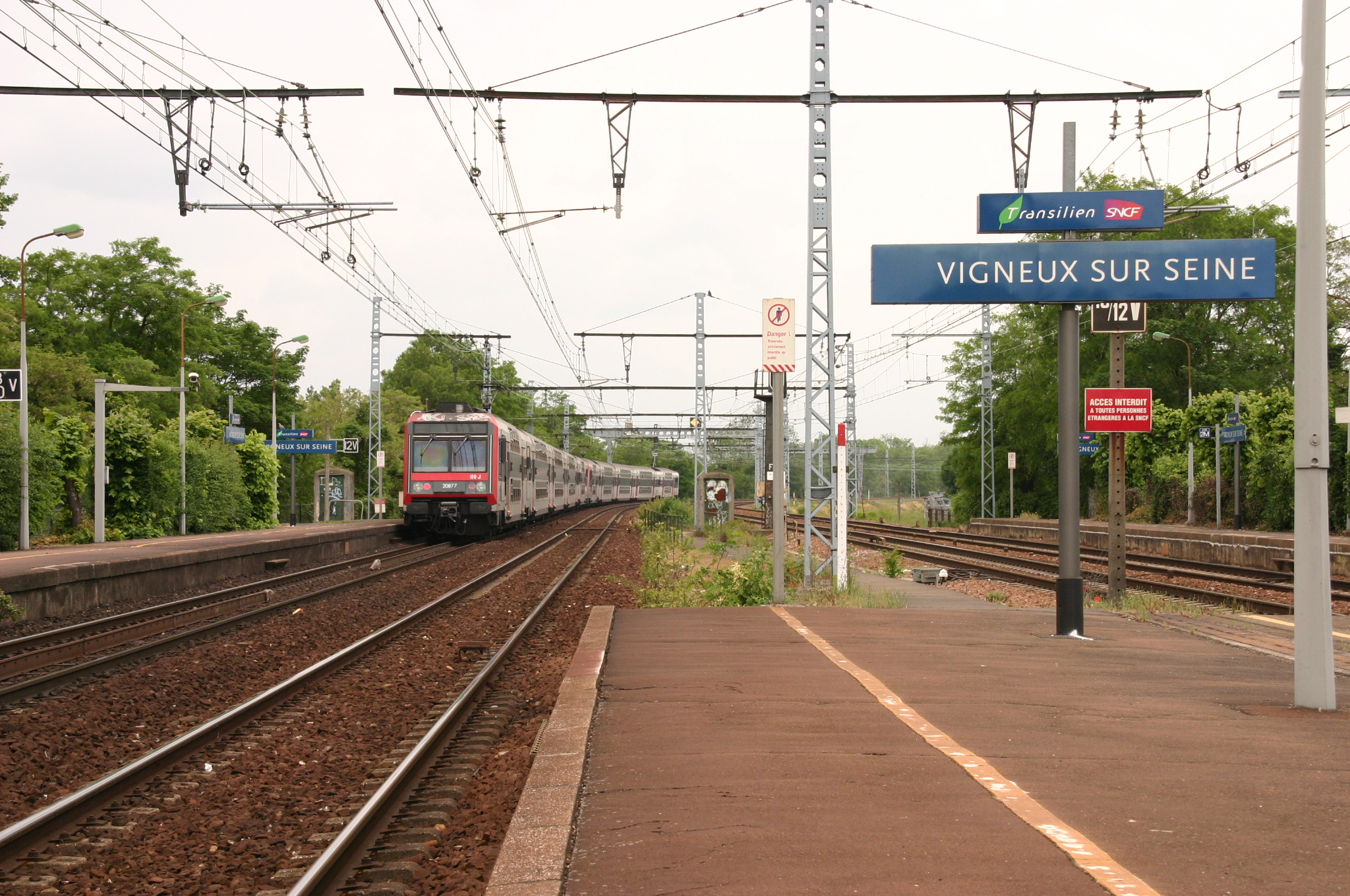 La Gare de Vigneux-sur-Seine, Vigneux-sur-Seine , département l'Essonne, France